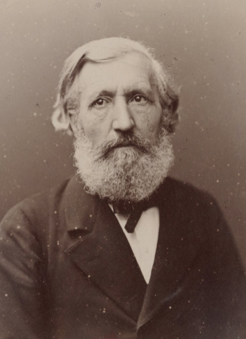 Amédée Jérôme Langlois journaliste